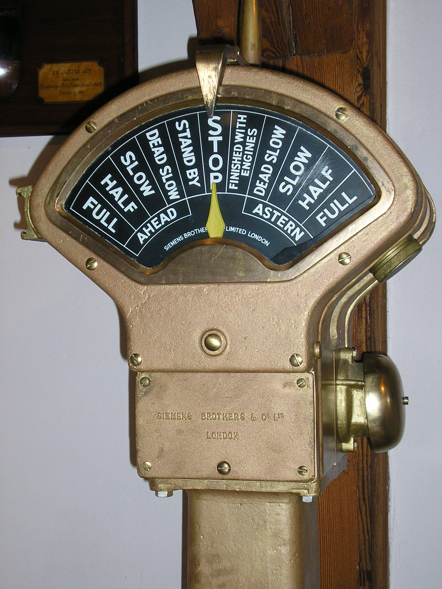 Maschinentelegraf von Siemens Brothers & Co. Ltd, London im Flensburger Schiffahrtsmuseum